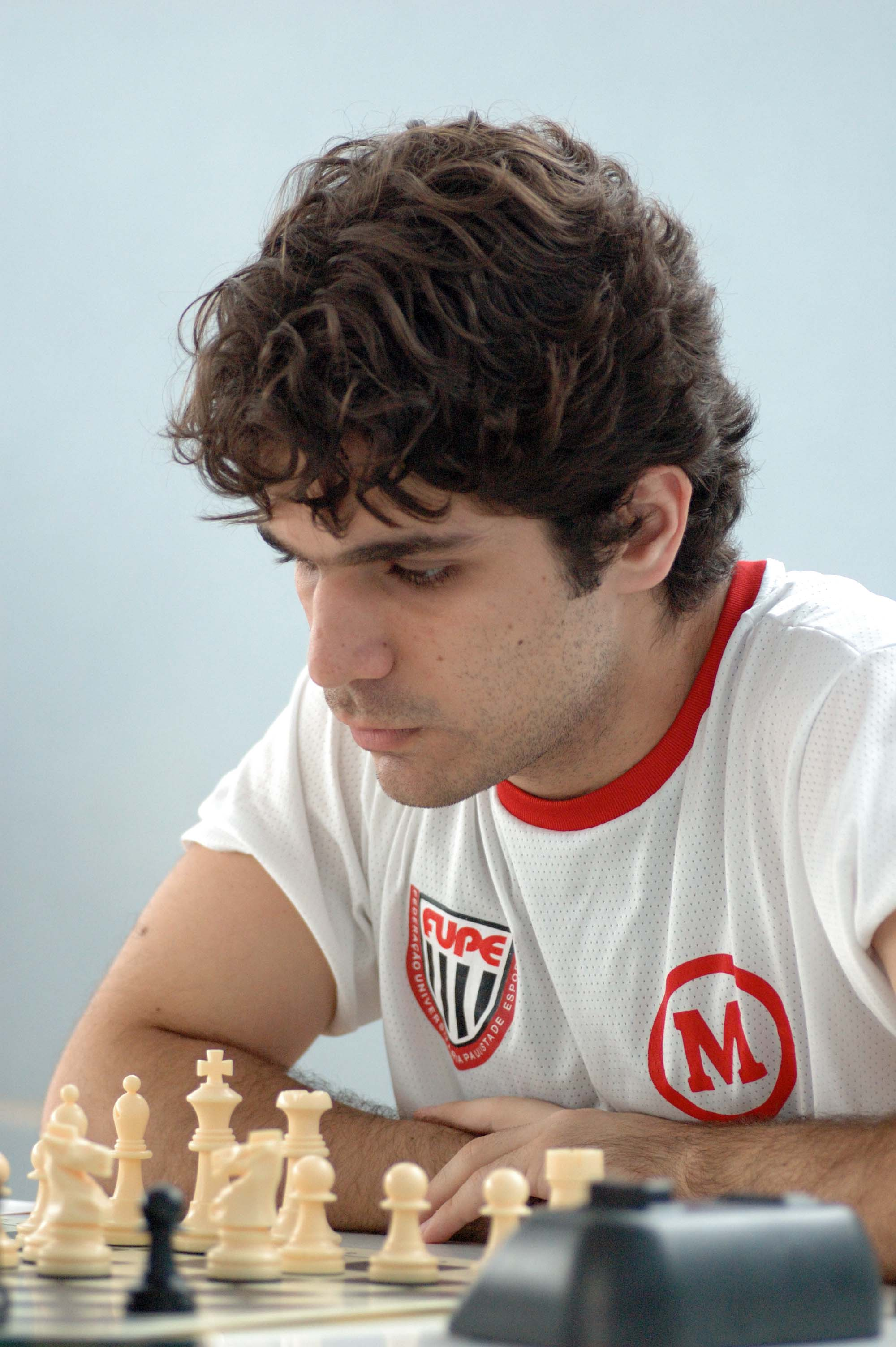 El Maestro Internacional brasileño Krikor Sevag Mekhitarian en la primera ronda del XXI Open Internacional de Ajedrez de Moratalaz (Madrid).